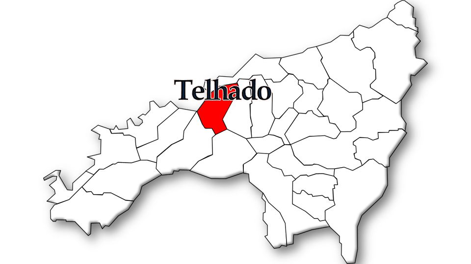 População